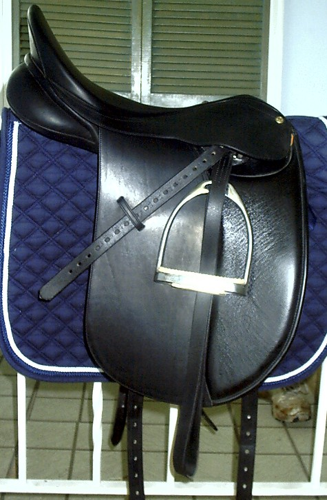 Dressage saddle, Collegiate brand